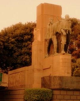 Messina Monumento ai Caduti della prima Guerra Mondiale (G. Nicolini)